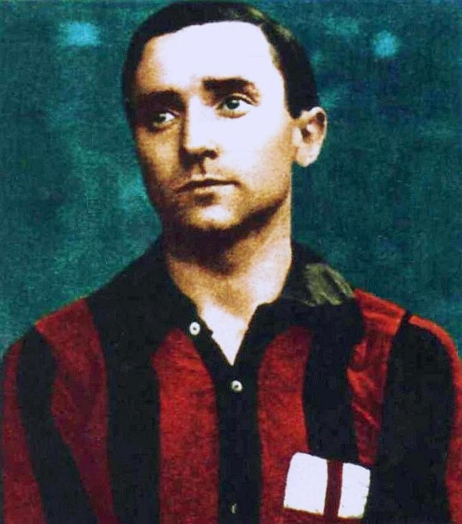 Louis Van Hege all AC Milan, prima della prima guerra mondiale (colorazione del periodo).